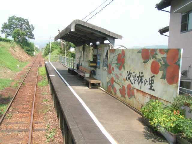 円田駅